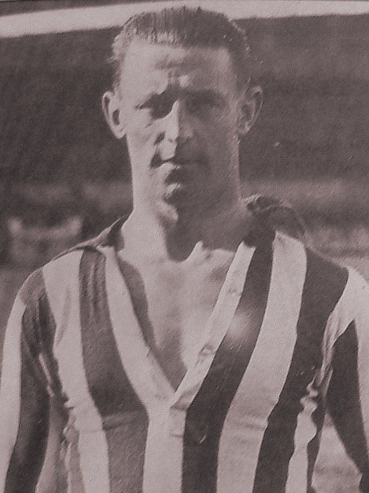 Sjef van Run, PSV-speler van 1926 tm 1942